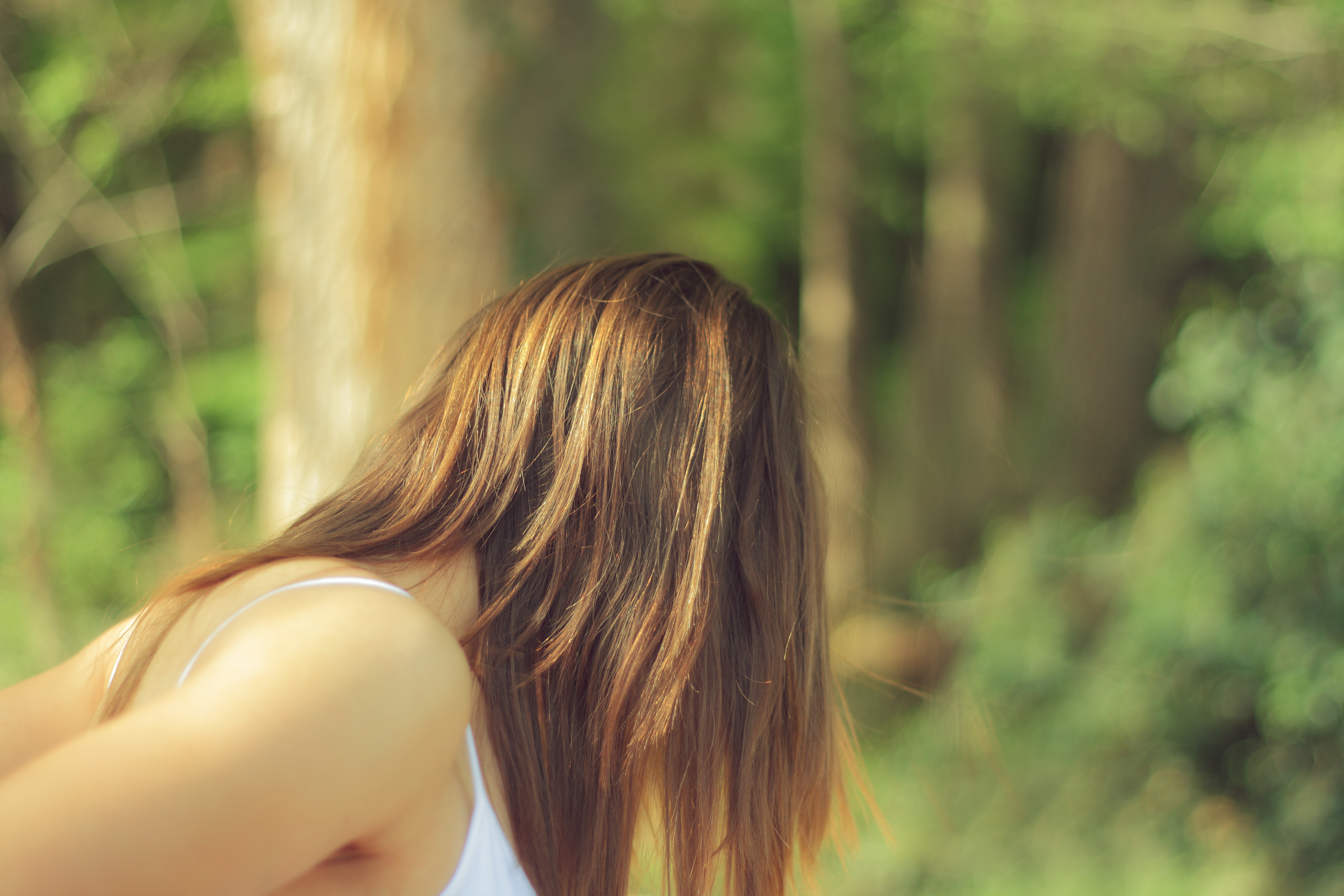 Monasterio de Piedra, España